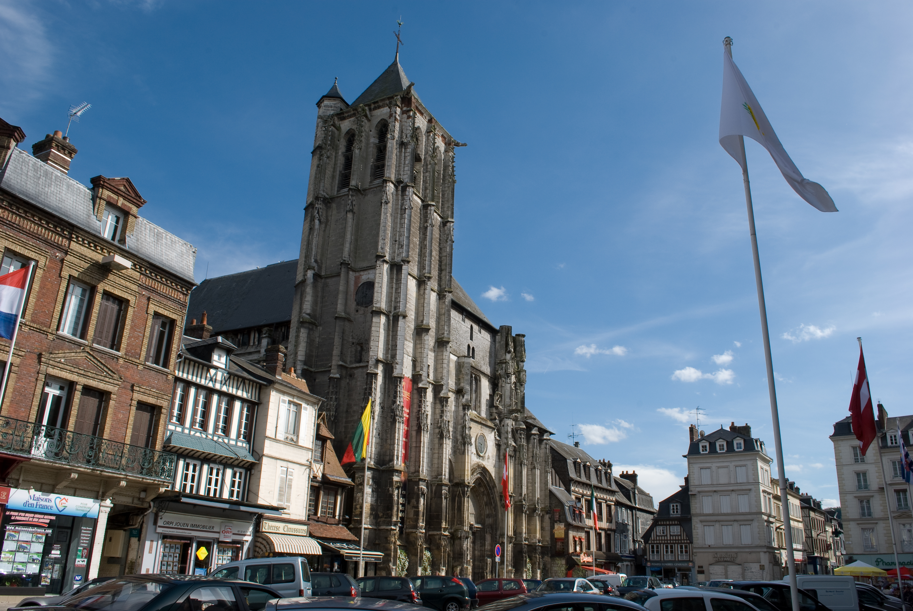 Centre-Ville de Pont-Audemer Rue de la République dominée par l'église Saint-Ouen